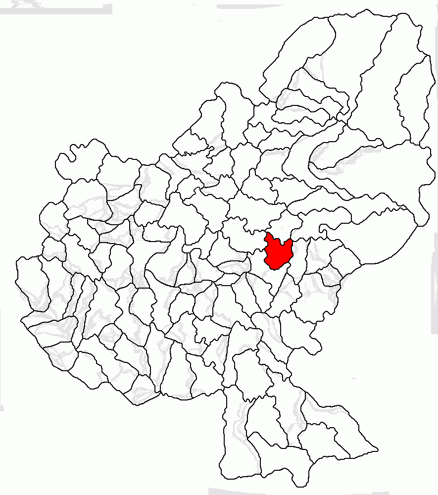 Categorie:Hărţi ale judeţului Mureş